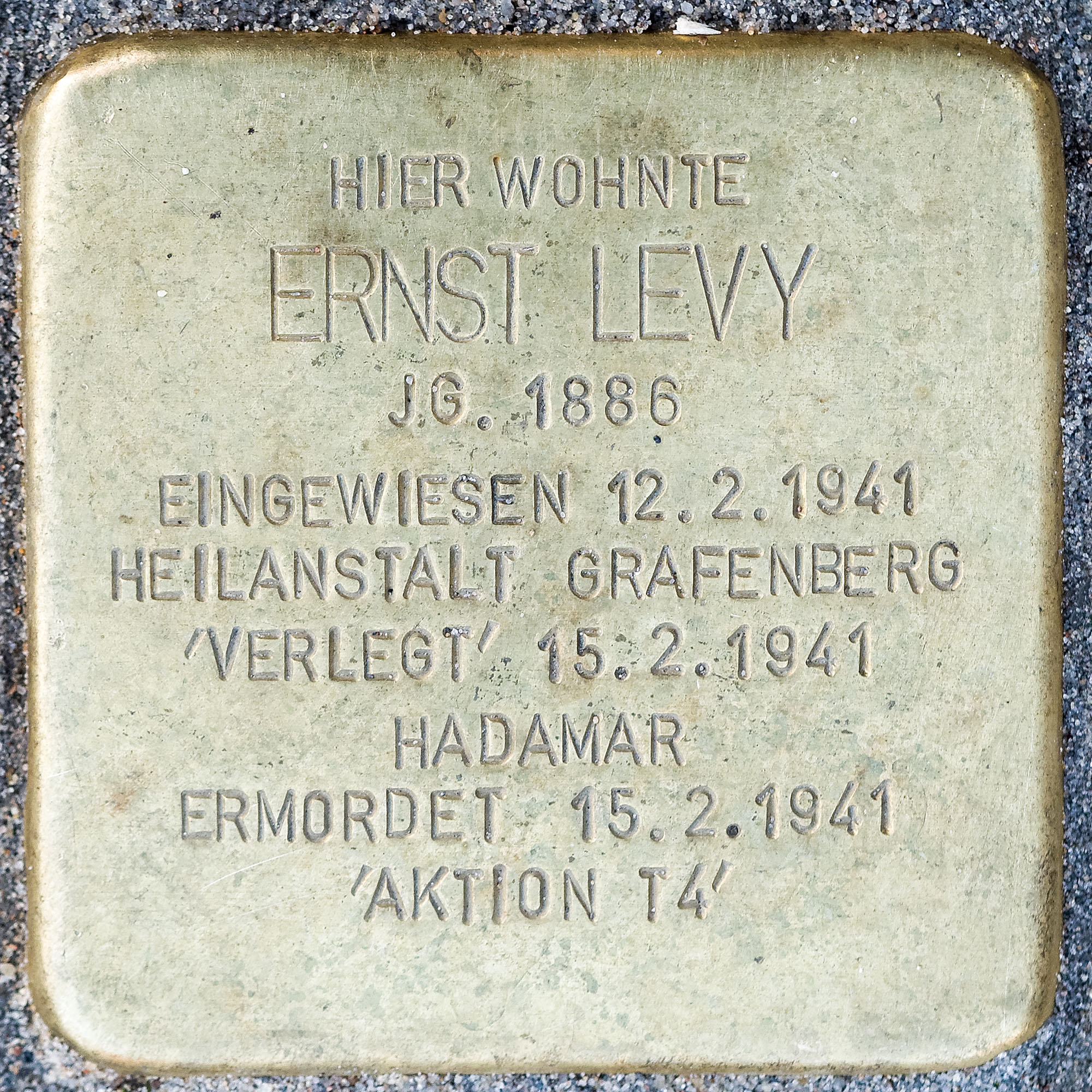 Stolpersteine Willich: Levy, Ernst